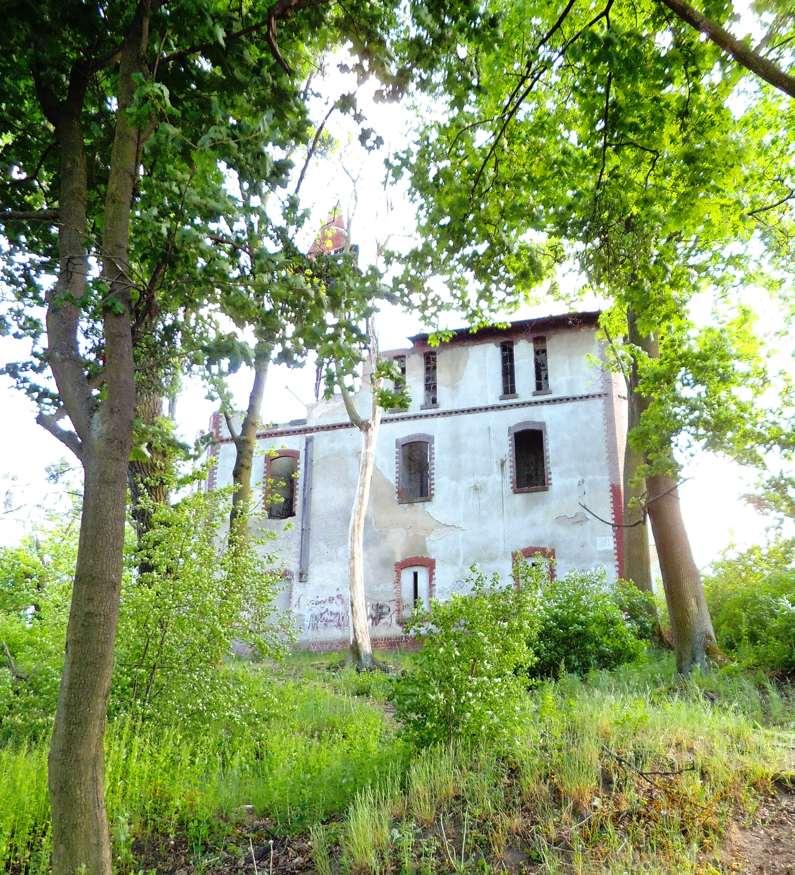 Poligonowa wieża ciśnień w Toruniu, 2020 rok